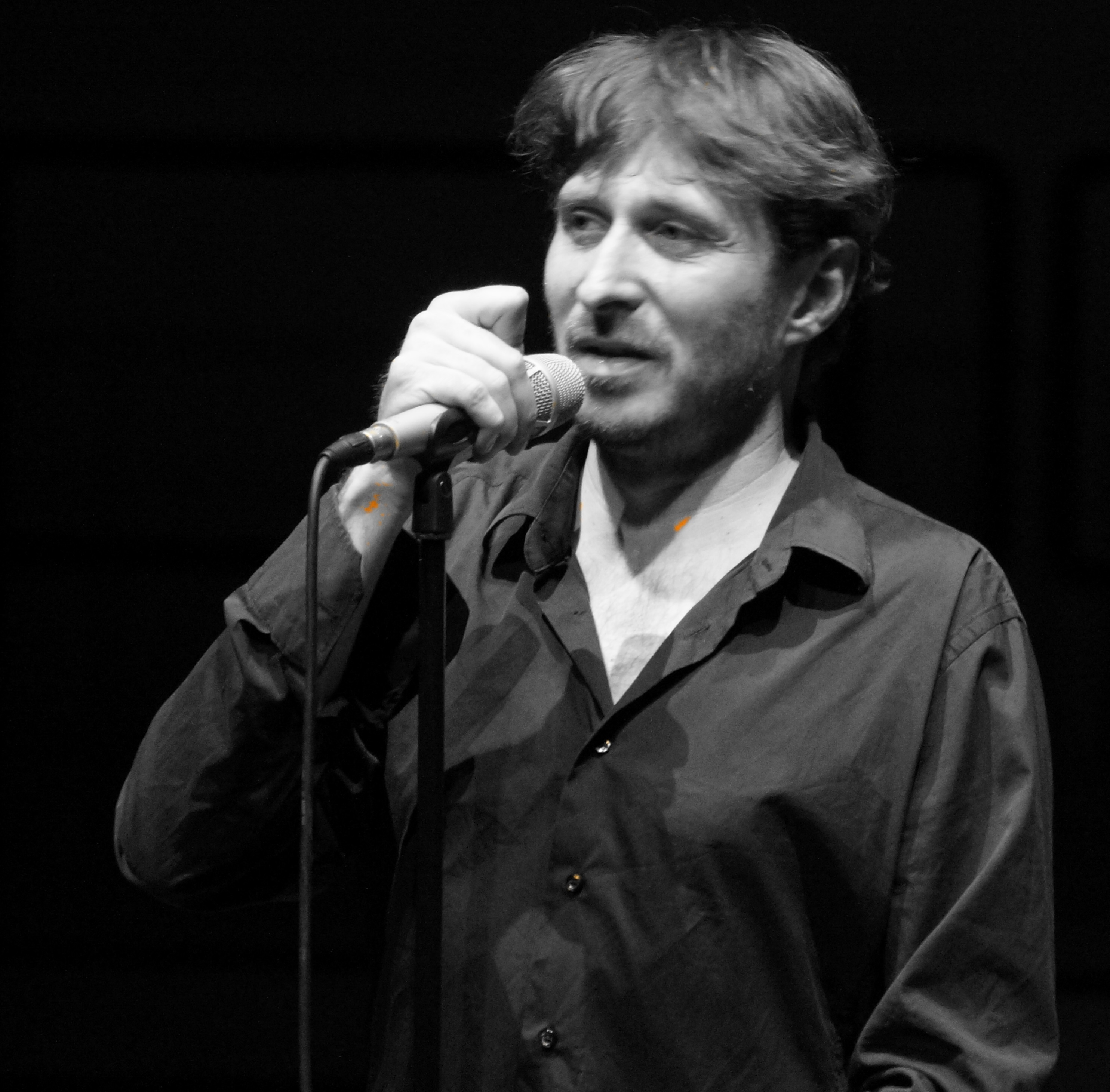 Loïc Lantoine en concert au conservatoire de Reims.